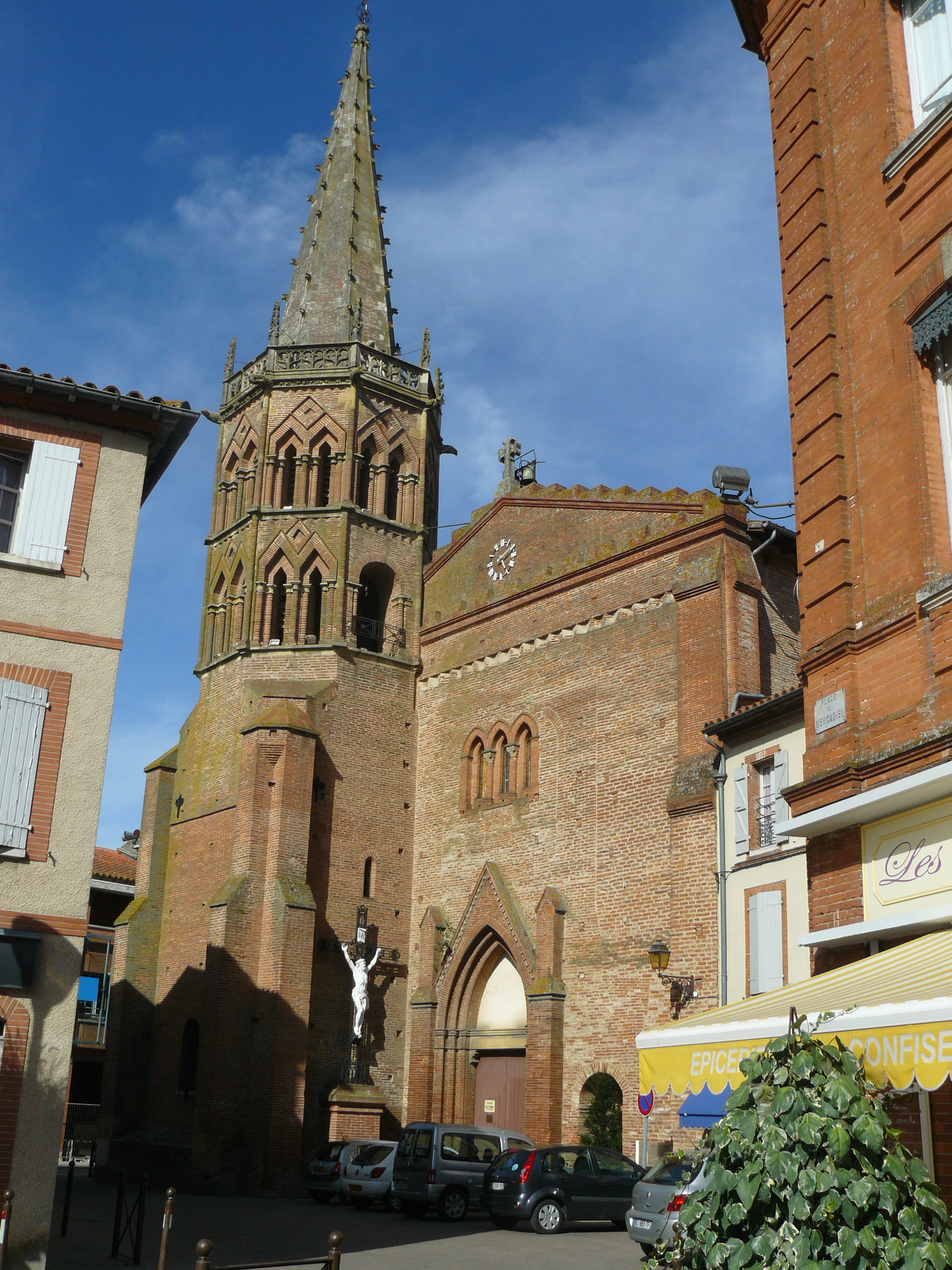 Muret (Haute-Garonne, France) - Vue de l'église Saint-Jacques depuis la place Mercadieu.